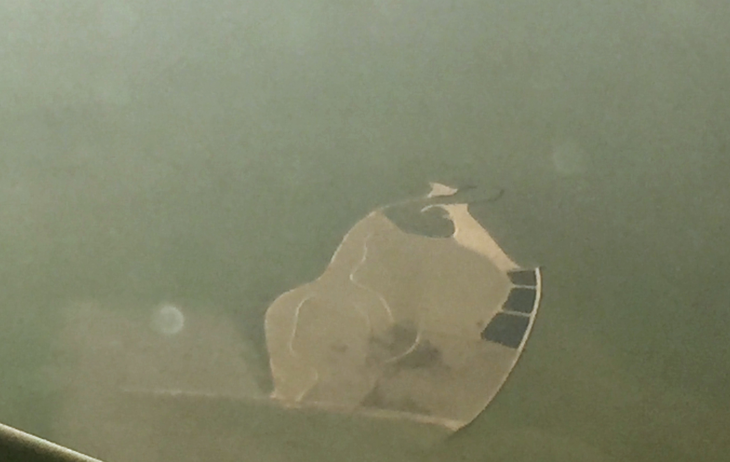 Een eiland van de Marker Wadden, 27 maart 2017